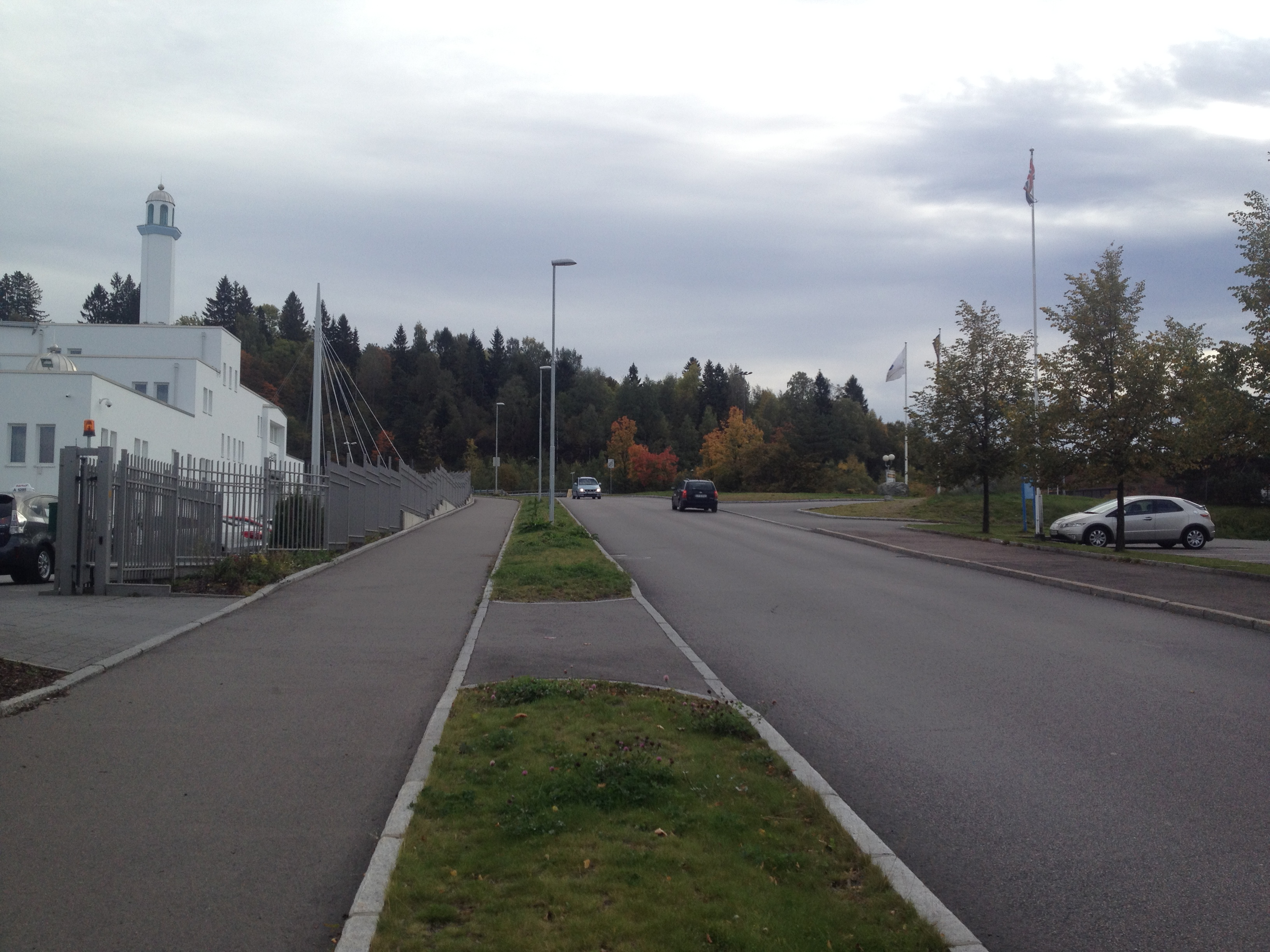 Søren Bulls vei på Furuset.